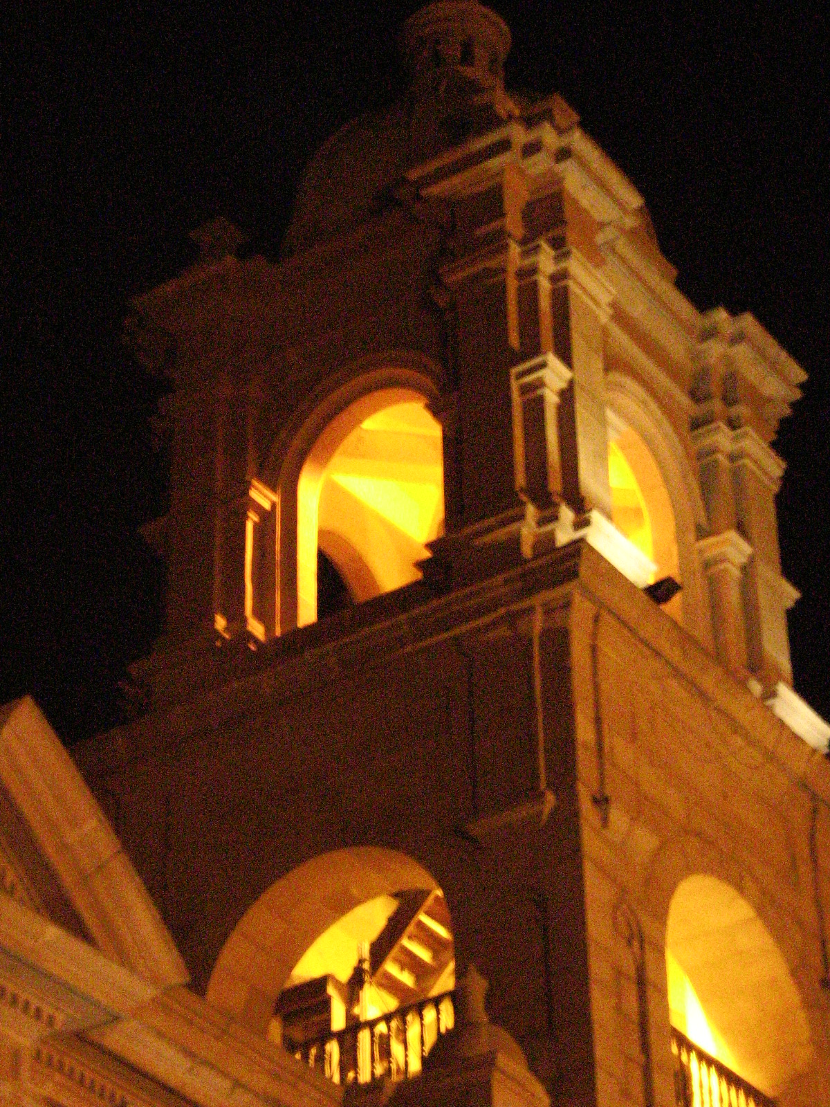 campanario catedral de tacna